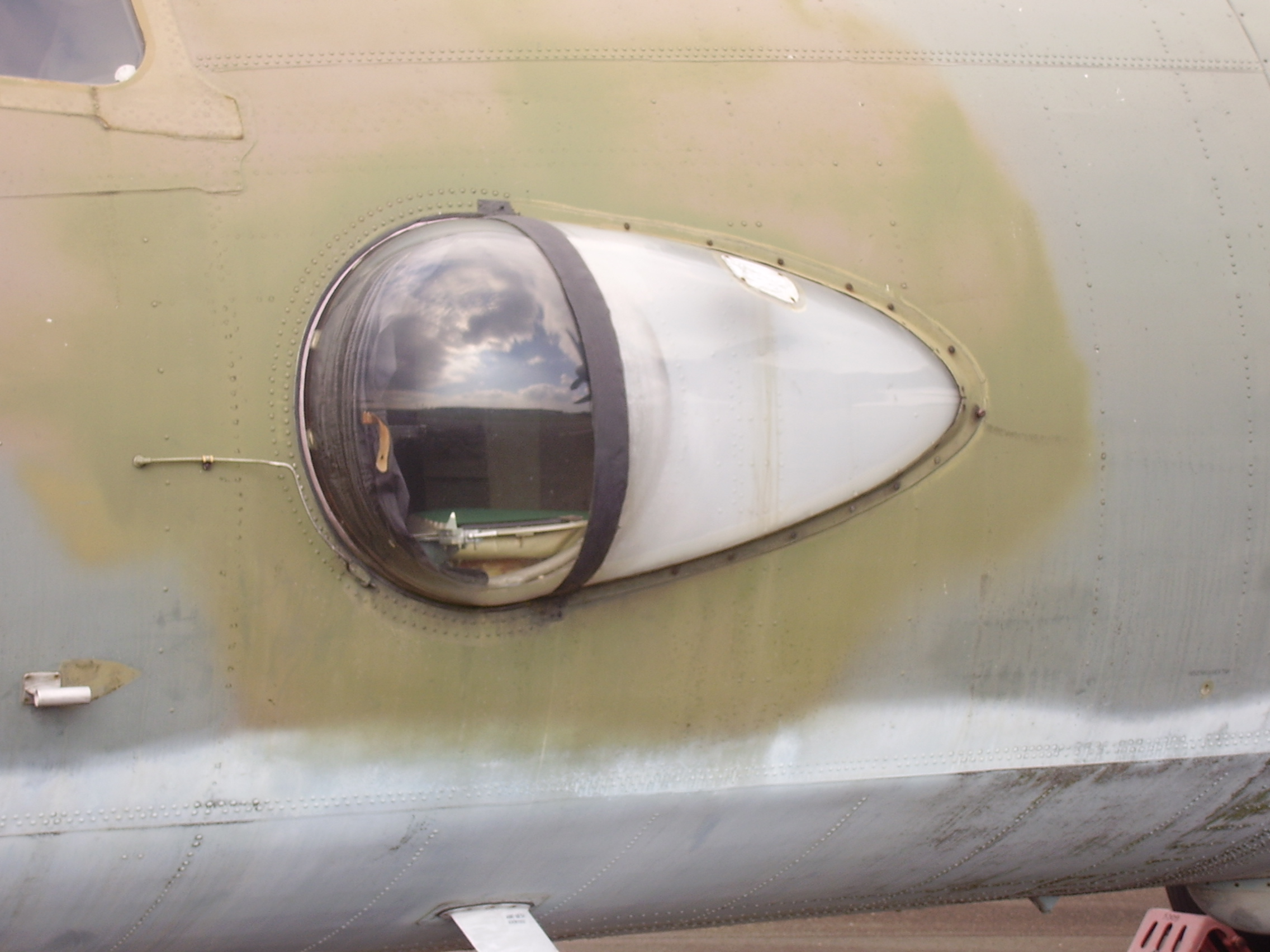 Luftwaffenmuseum der Bundeswehr; Airforce Museum of the Bundeswehr; Berlin-Gatow